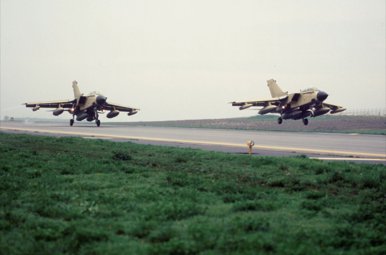 Tornado italiani al decollo da Gioia del Colle, per partecipare all'Operazione Desert Storm in Iraq.